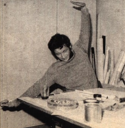 Marian Fikus - architekt, laureat Honorowej Nagrody SARP 2008